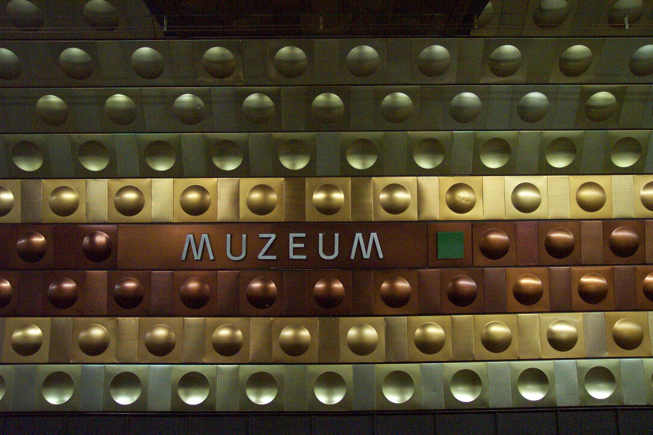 Metro station Muzeum (line A) in Prague - Stanice metra Muzeum (trasa A) v Praze